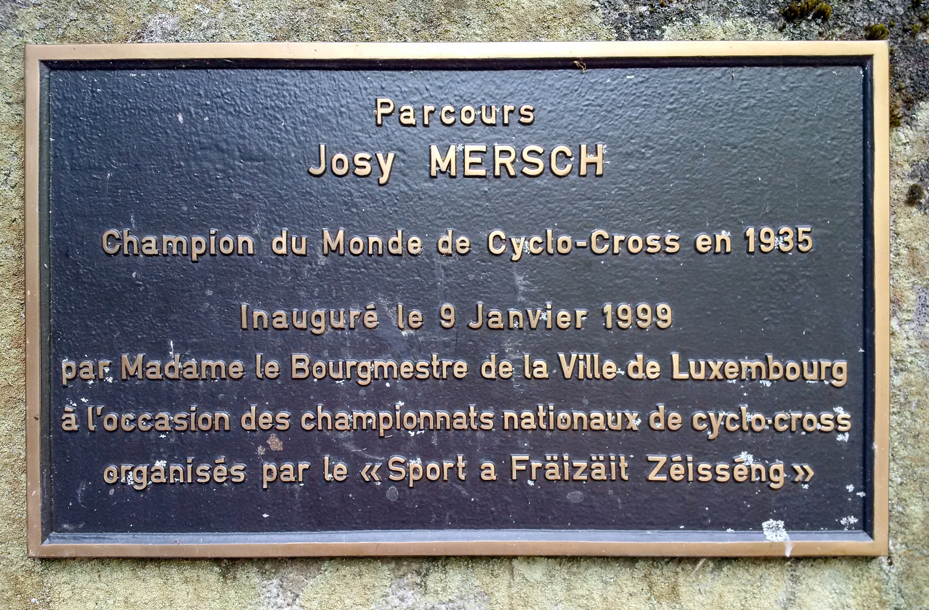 Erënnerungsplaque un de Josy Mersch am Zéisséngerbësch